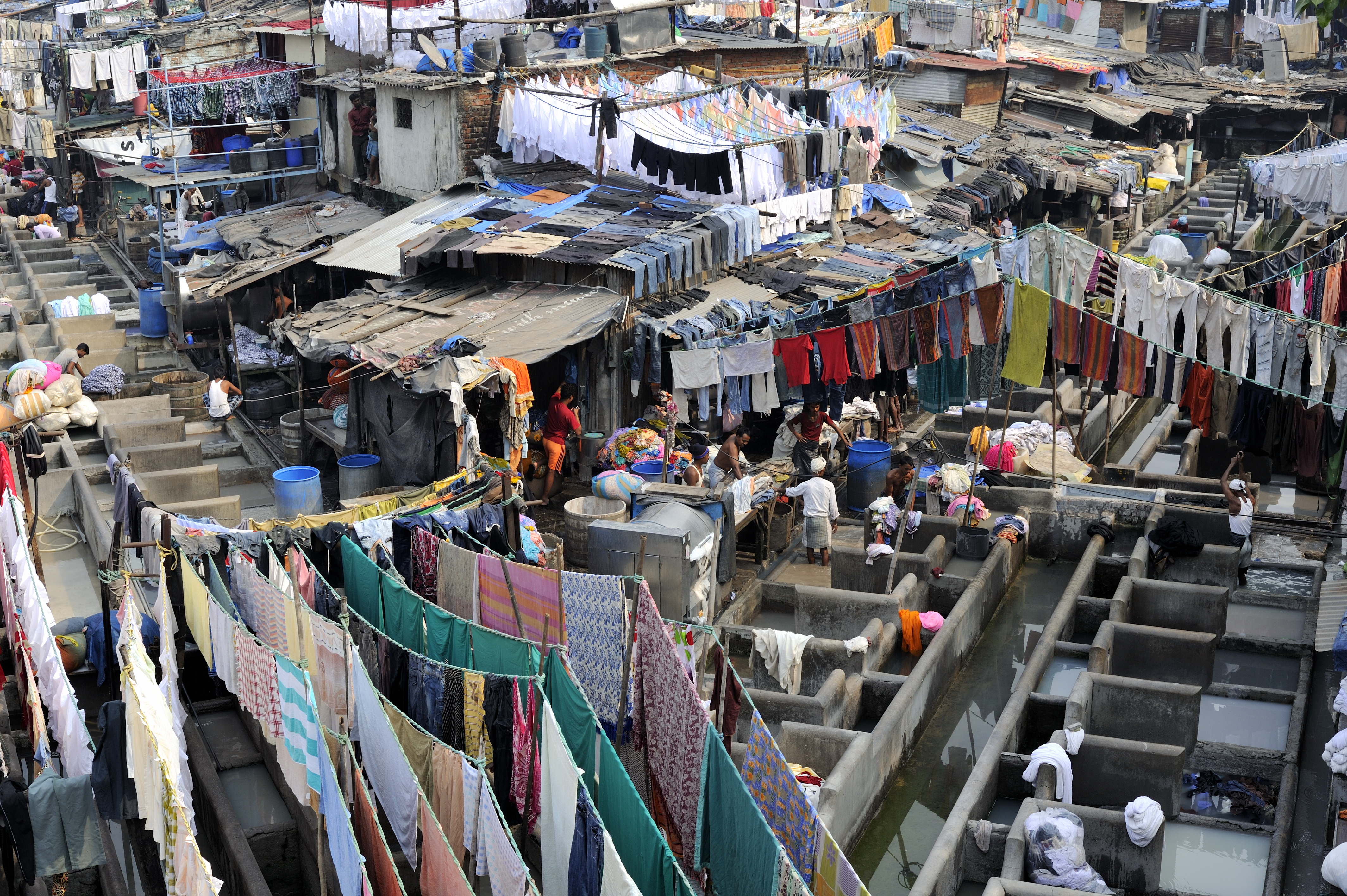 Dhobi_Ghat_DSC3272